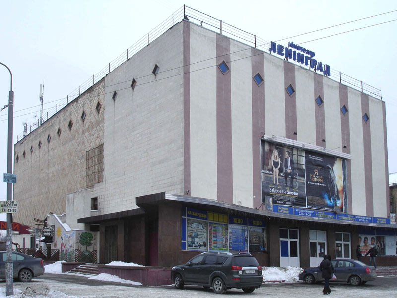 Киев, кинотеатр "Ленинград"